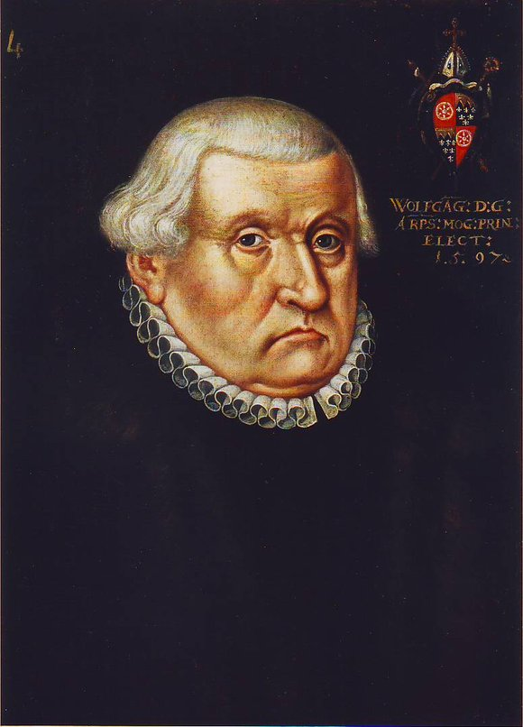 Wolfgang von Dalberg (1538-1601), ab 1582 Erzbischof und Kurfürst von Mainz und damit Erzkanzler des Heiligen Römischen Reiches.